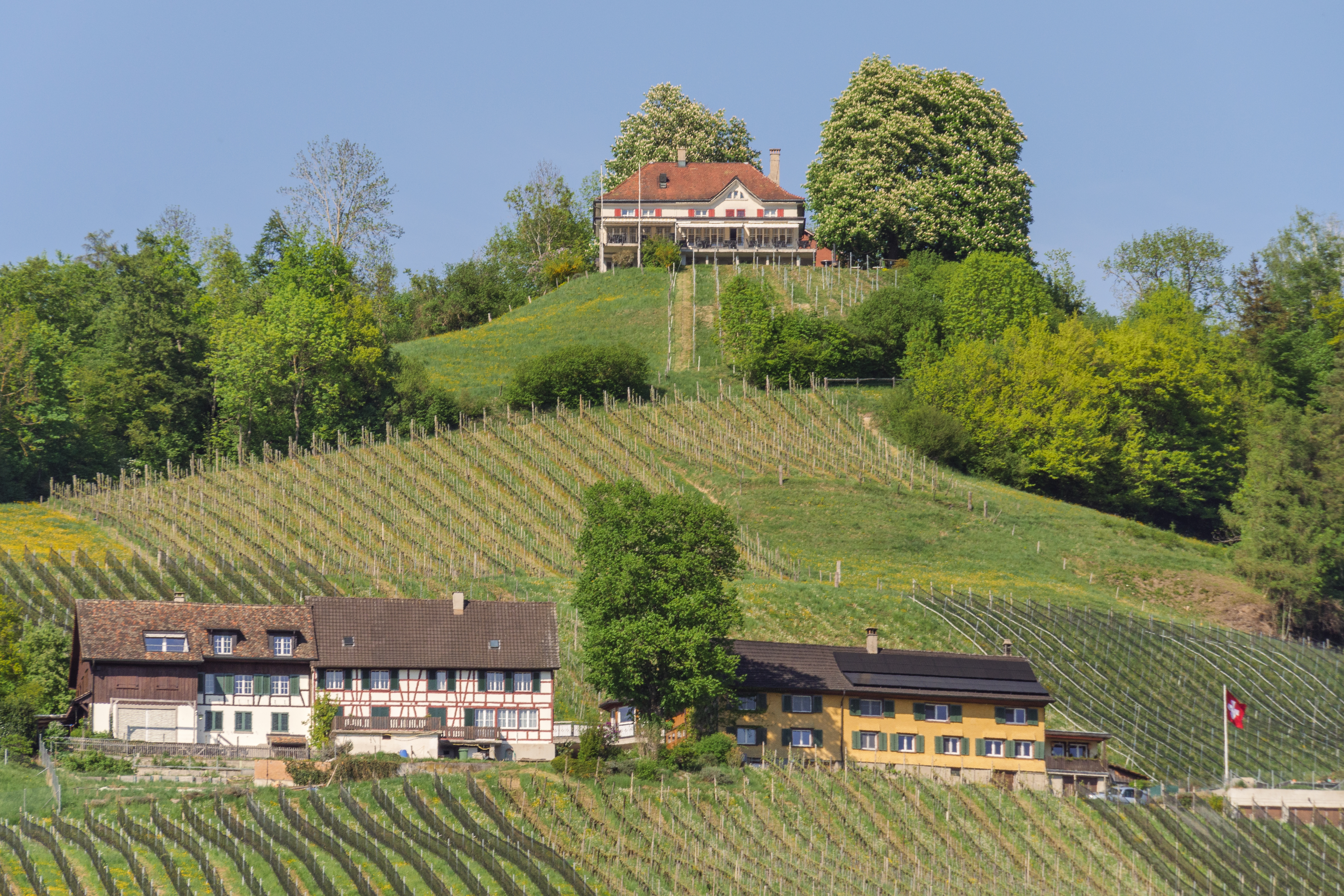 Weinfelden: Weinbau am Thurberg unterhalb des gleichnamigen Restaurants, dazwischen die Bebauung "Hindere Berg" (Thurbergstrasse)